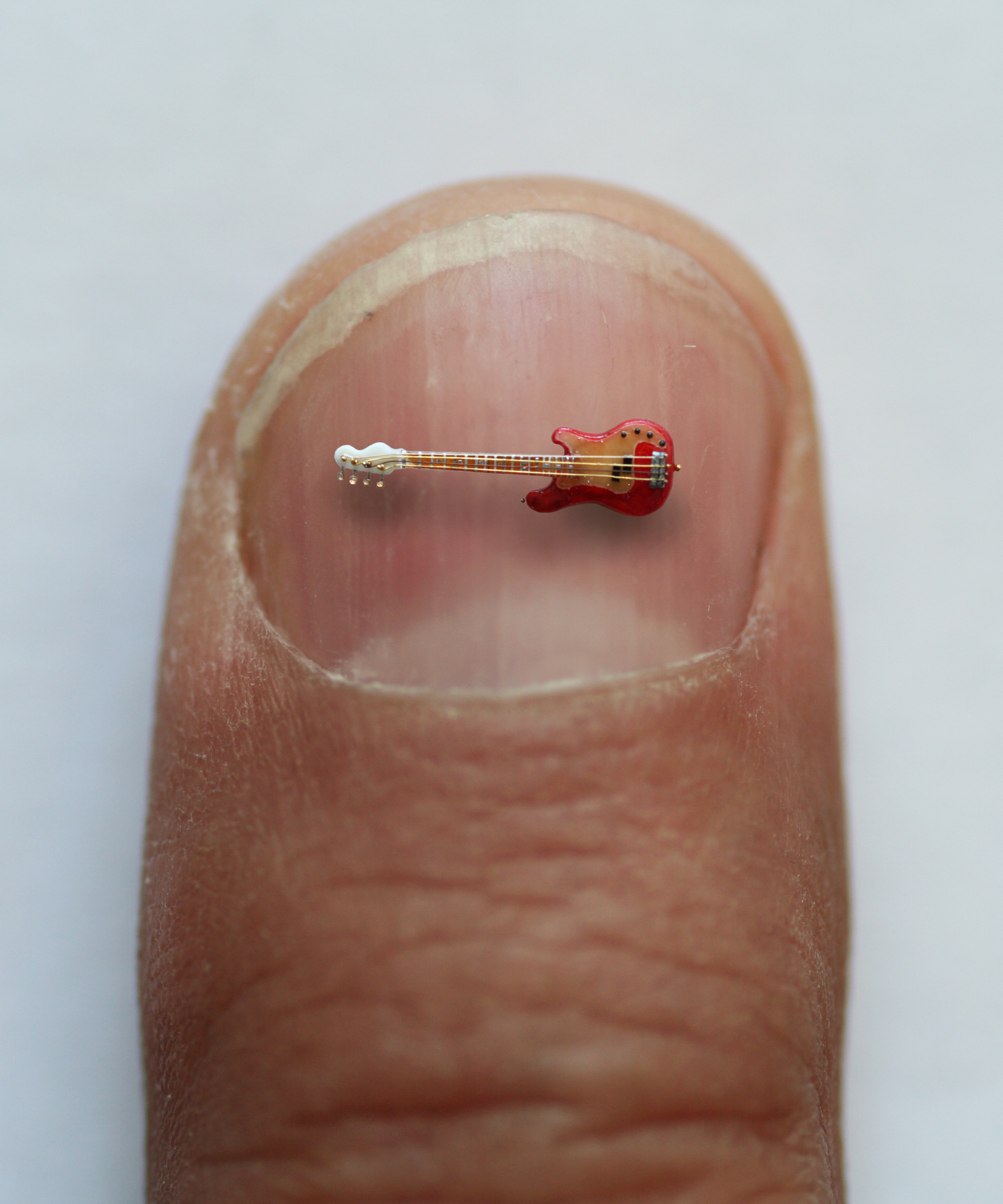 Миниатюрная копия бас-гитары группы Scorpions